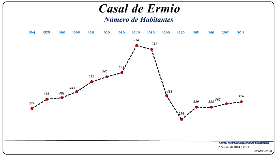 População